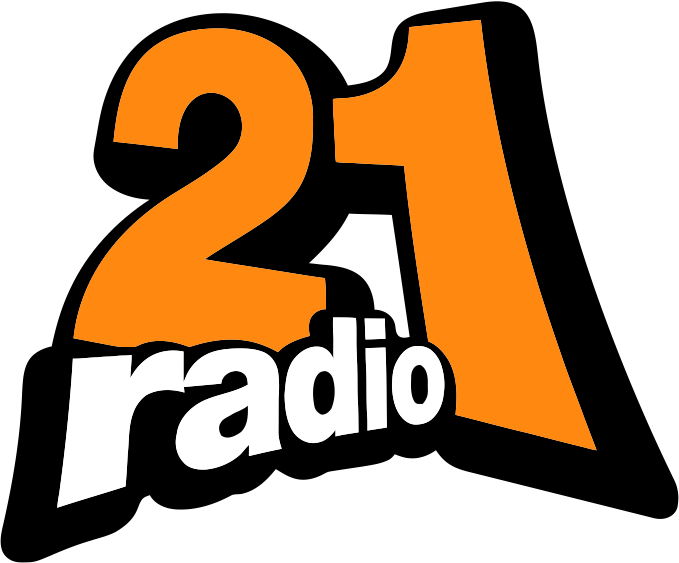 Logo Radio 21 (2004 - 2010)